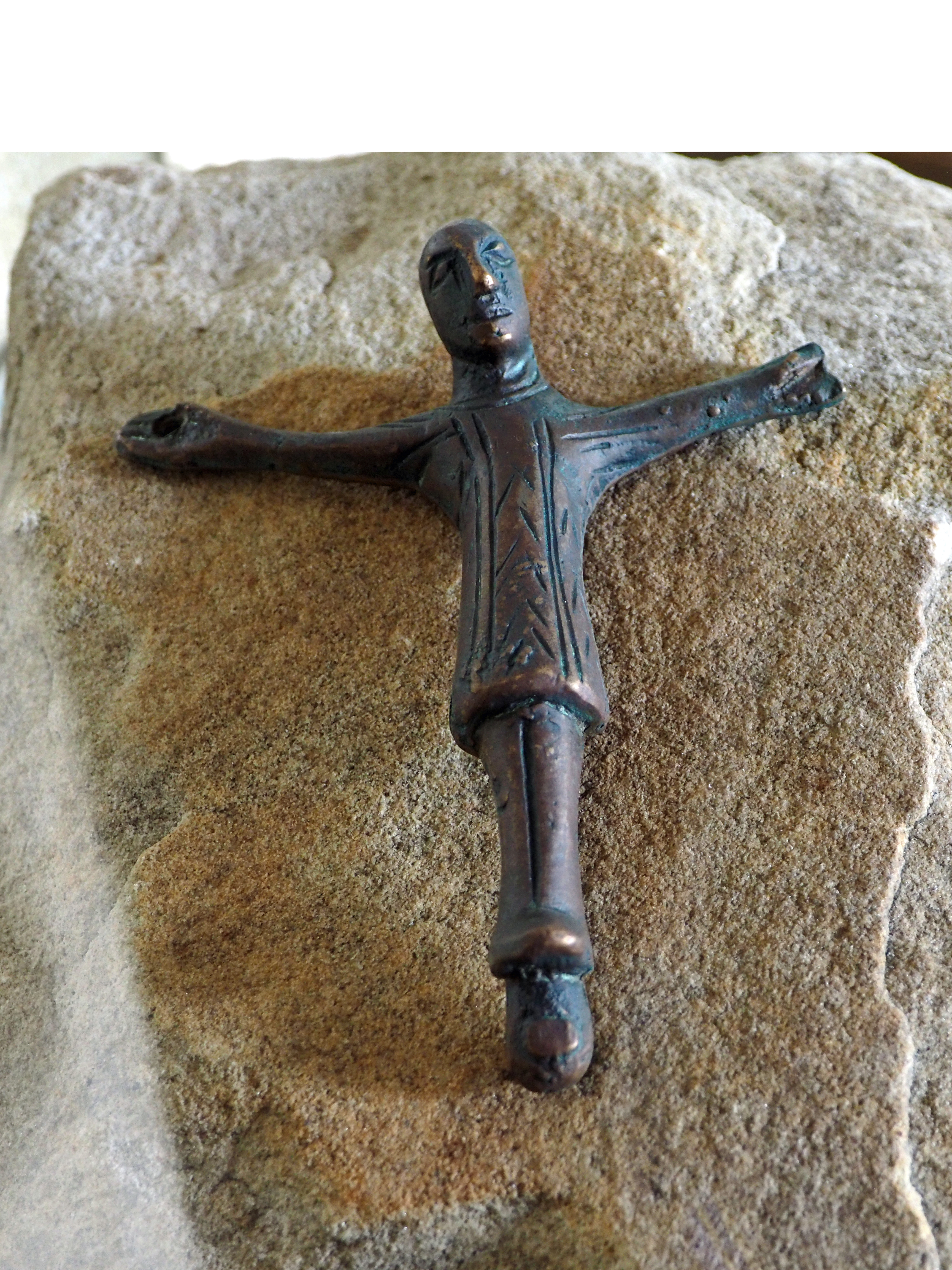 Nachbildung eines Bronze-Kruzifix aus dem 10. Jahrhundert. Bei der Neugestaltung der St.-Peter-Paul-Kirche (1957–1959) im Bereich des Chorraumes entdeckt.